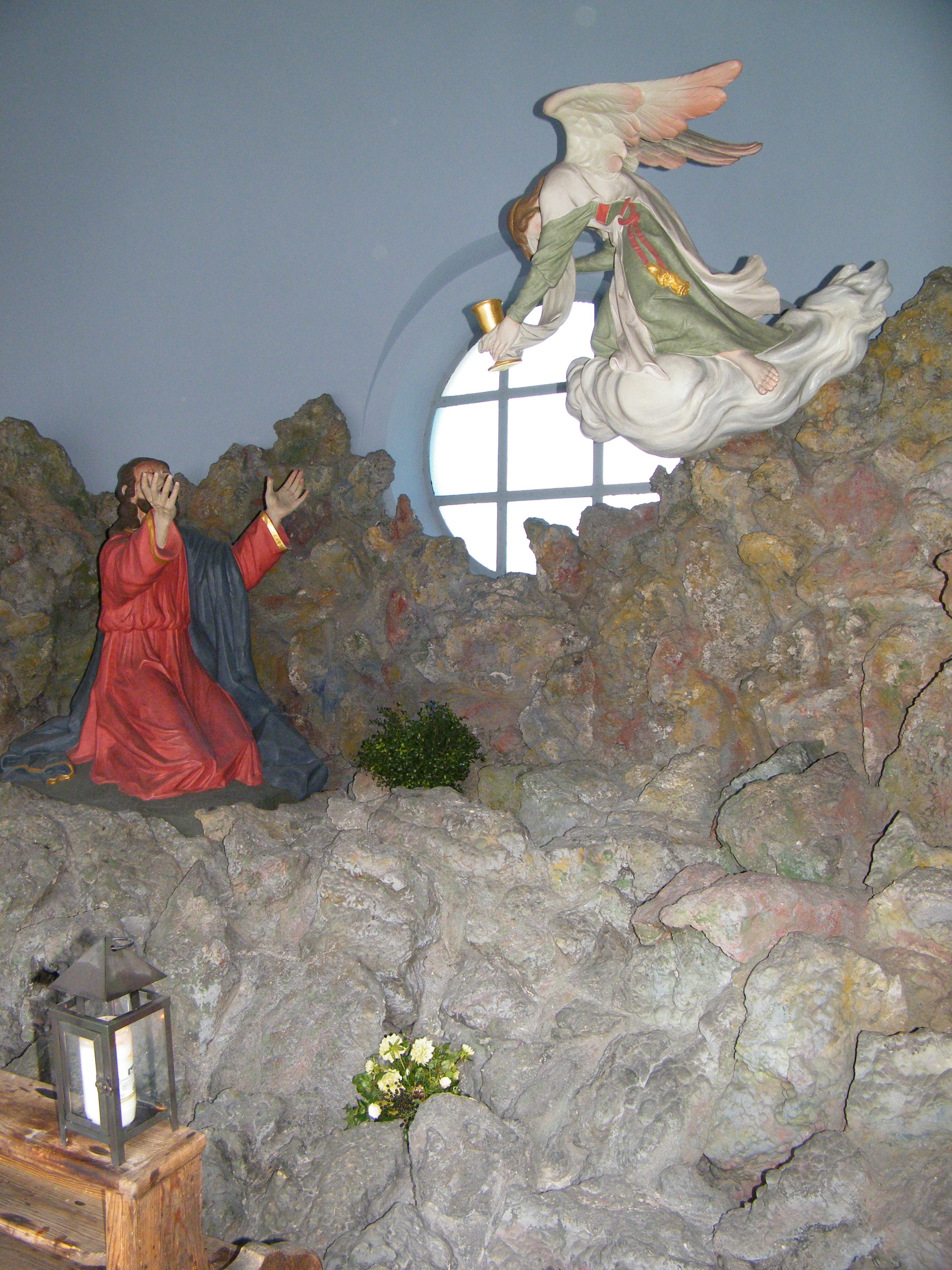 Kirche St. Anton in Kempten.